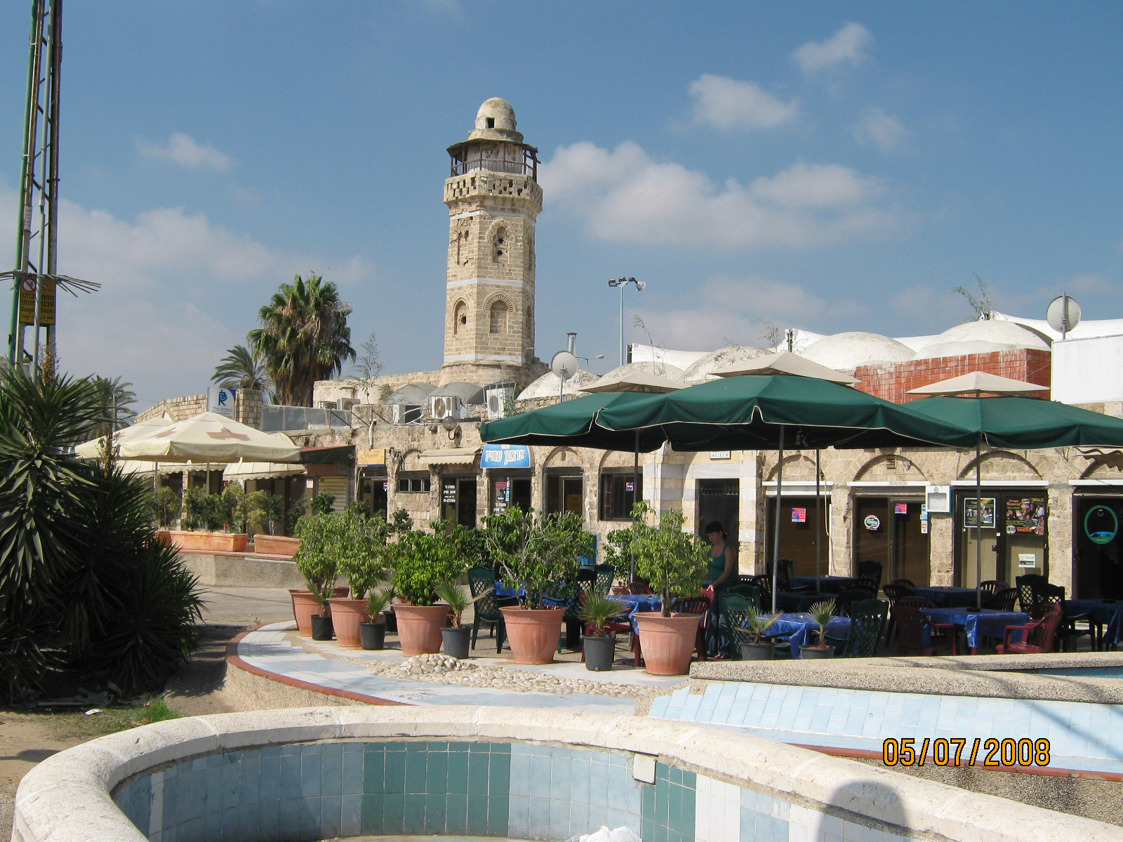 המסגד הגדול באשקלון נבנה בשנת 1300 על ידי הסולטן הממלוכי נאצר מוחמד. מכונה גם "החאן", אף שכנראה לא שימש לאירוח. כיום, חלק ממנו משמש כמוזיאון לתולדות עיר אשקלון.